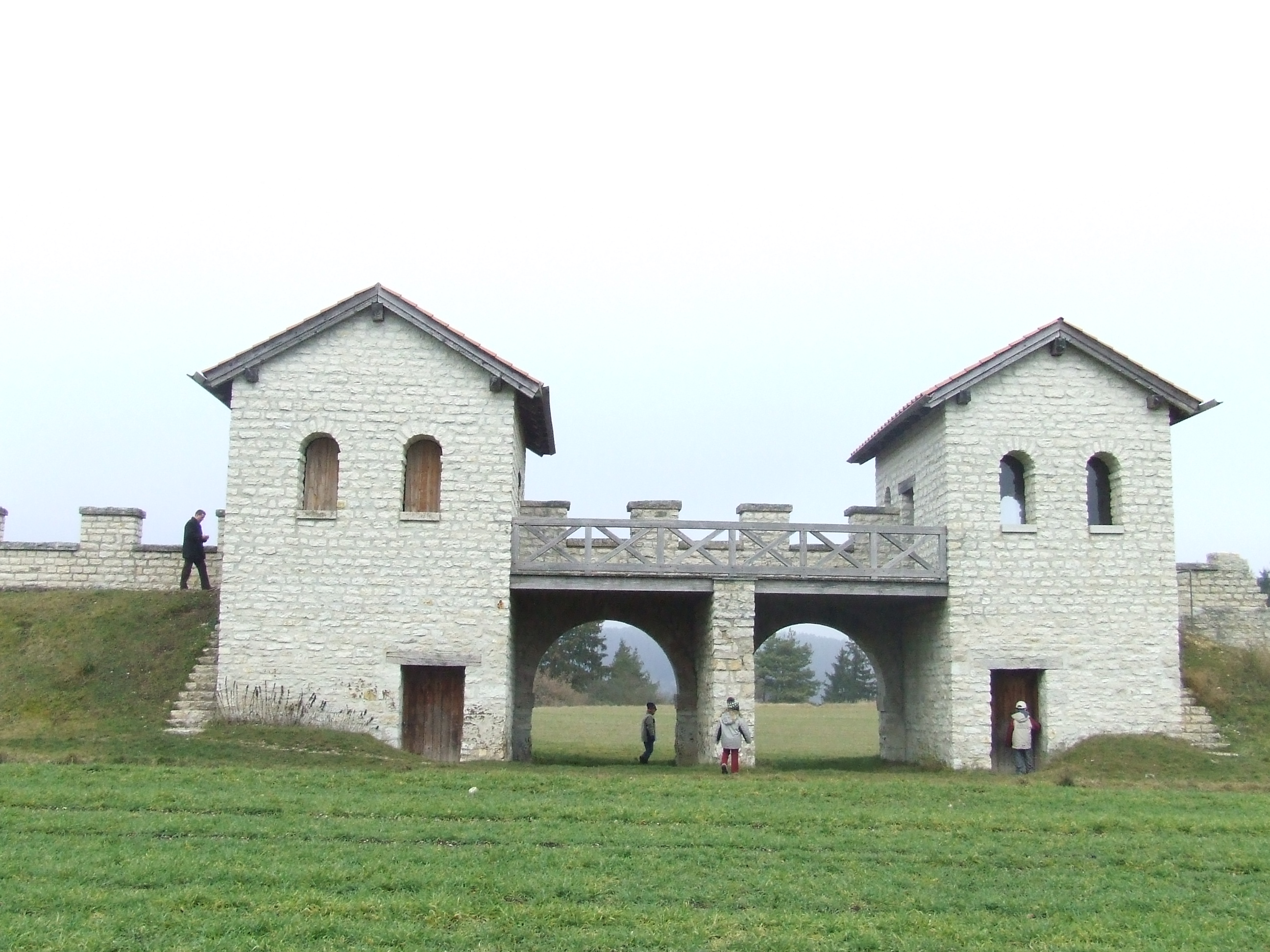 Kastell Pfünz ("VETONIANIS"), rekonstruiertes Nordtor, Innenseite